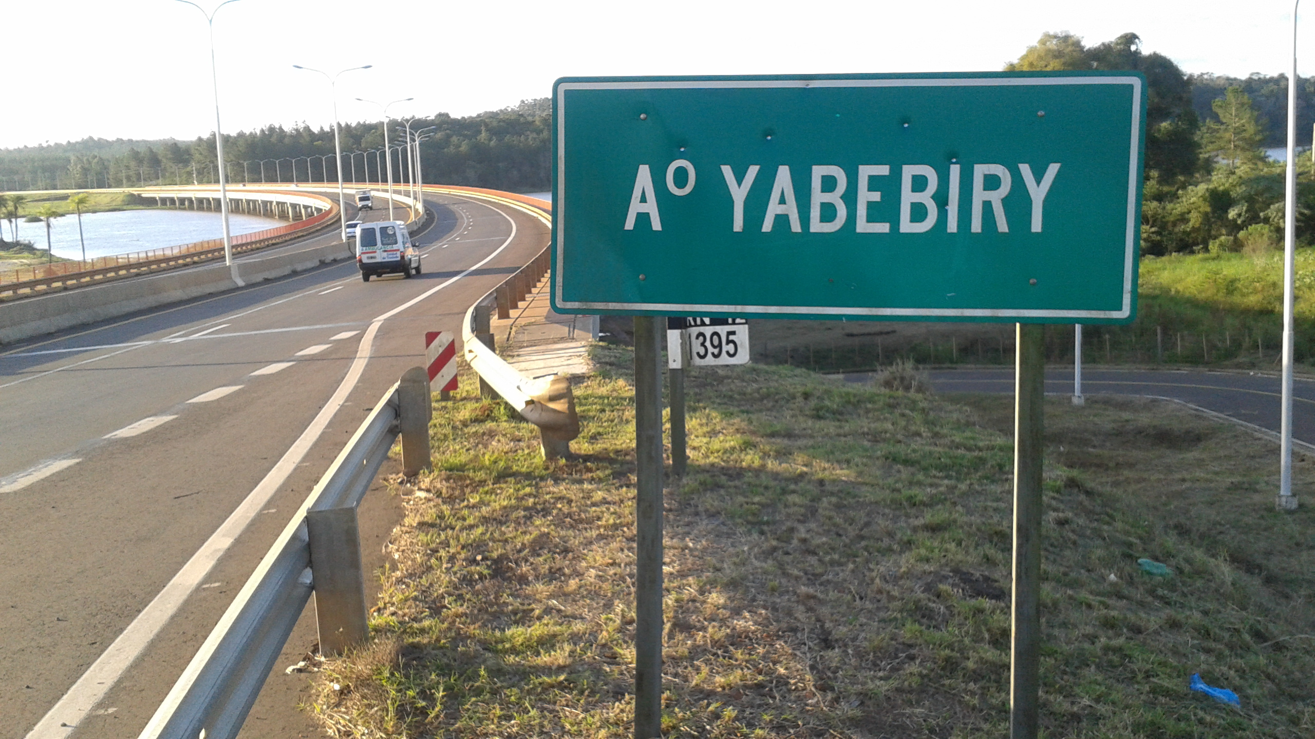 Cartel Arroyo Yabebiry (Ruta Nacional Nº12 - San Ignacio, Provincia de Misiones, Argentina).